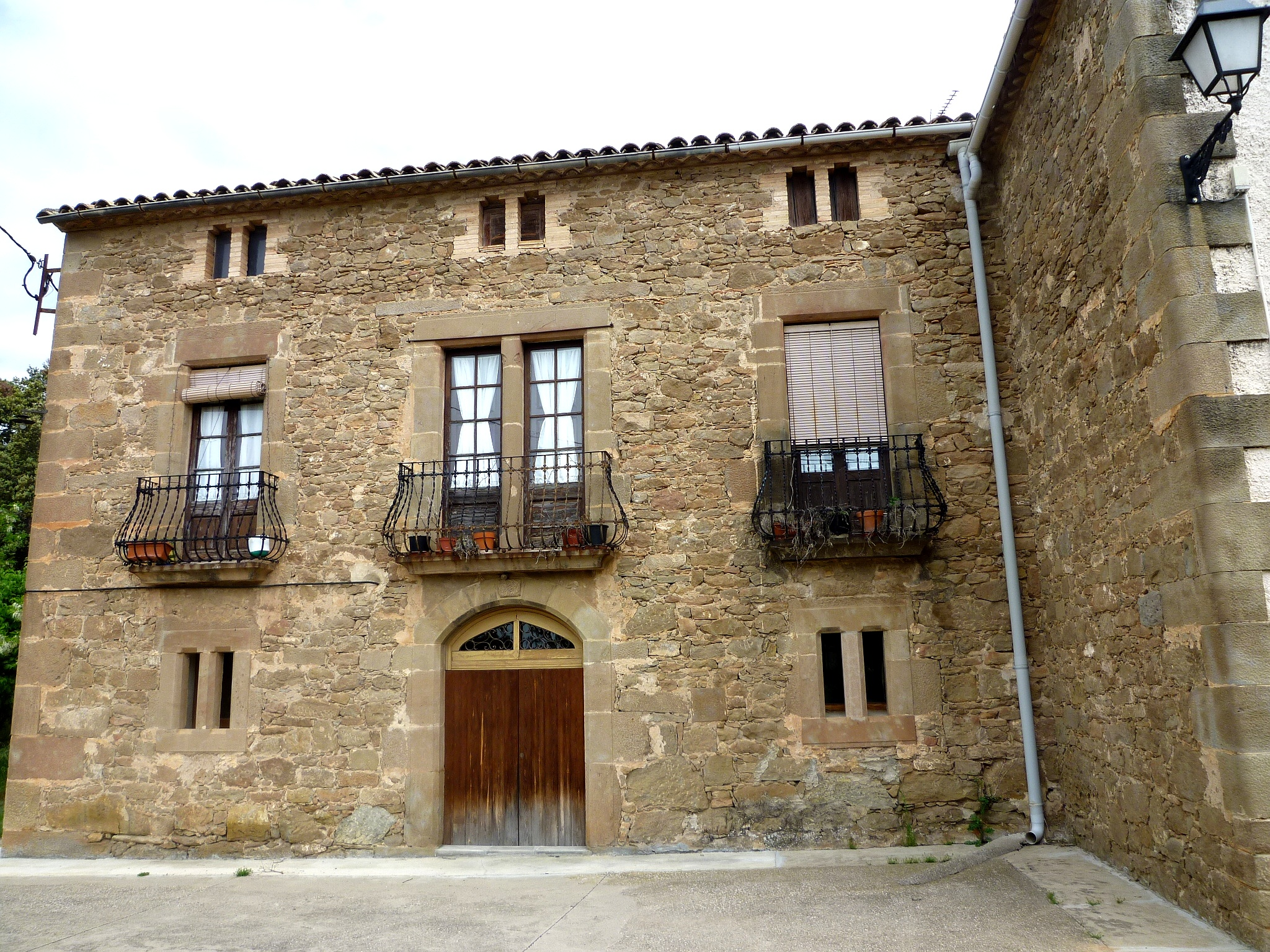 Rectoria de la parróquia de Santa Susanna, a tocar de l'església, del municipi de Riner (Solsonès)